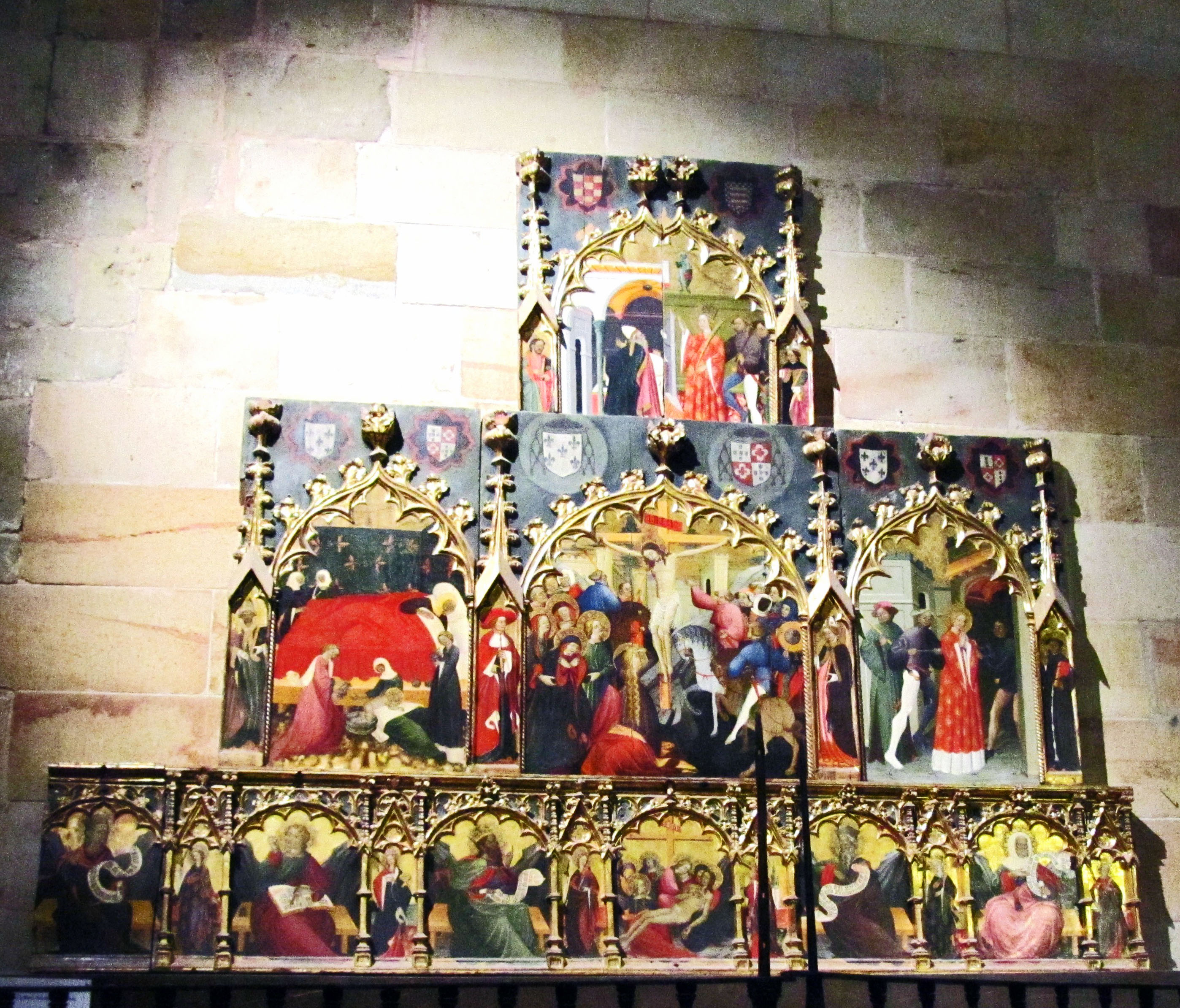 Retaule de la catedral de Sigüenza. San Juan y Santa Catalina Spain